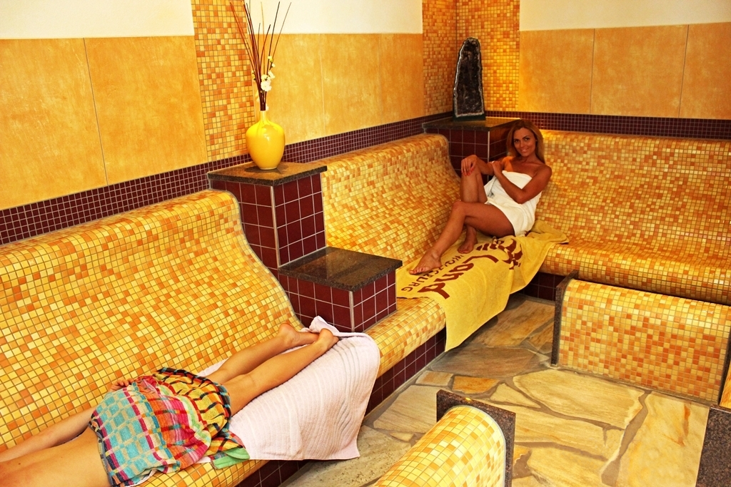 Deitsch: SaunaLandschaft